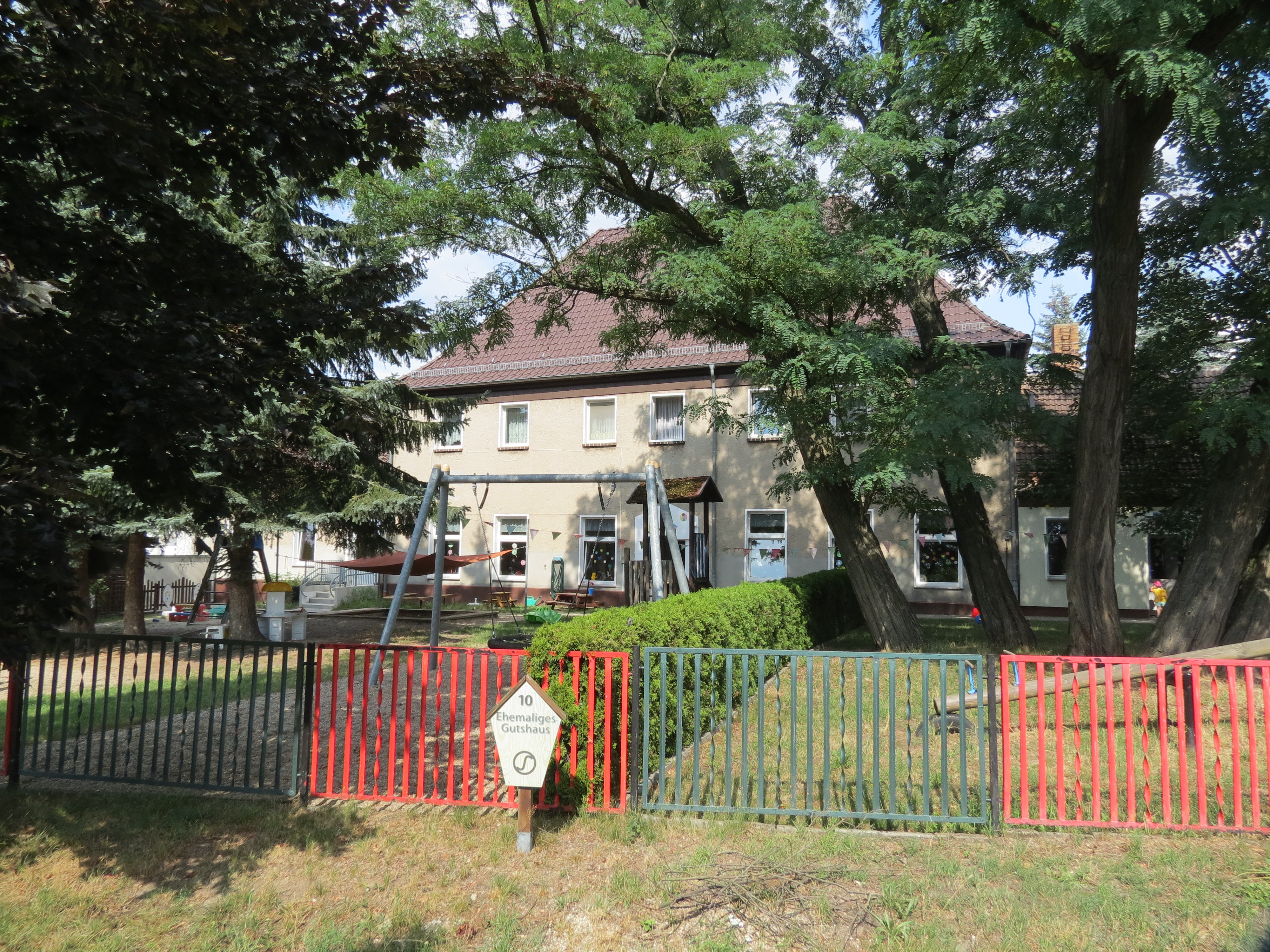 Bohsdorf, Gemeinde Felixsee, Landkreis Spree-Neiße, Brandenburg, ehemaliges Gutshaus und Kindergarten